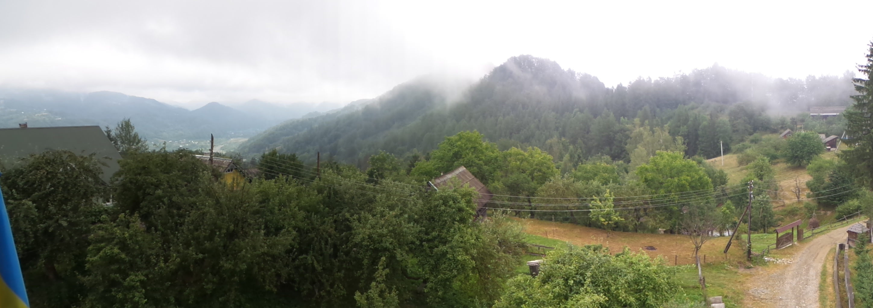 Панорама літнього краєвиду на перевалі Німчич